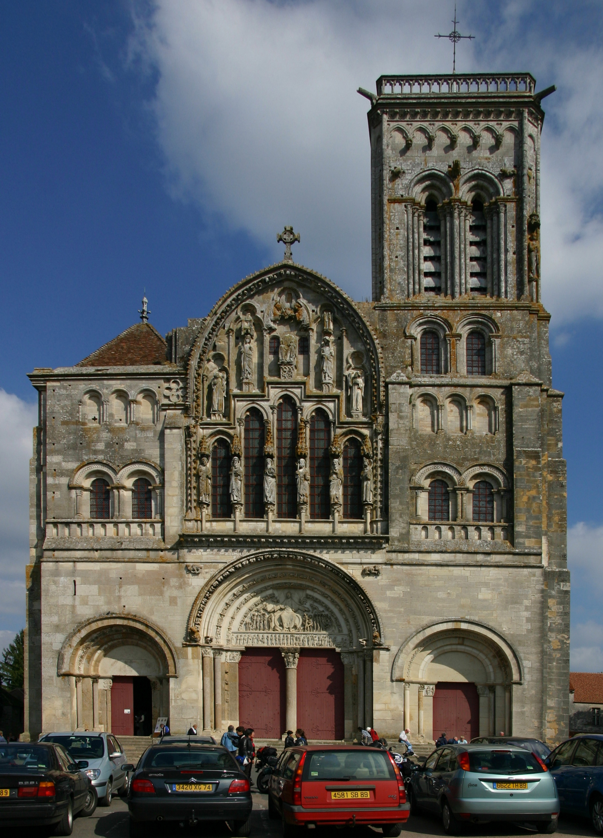 Vézelay, Basilika Sainte-Marie-Madeleine